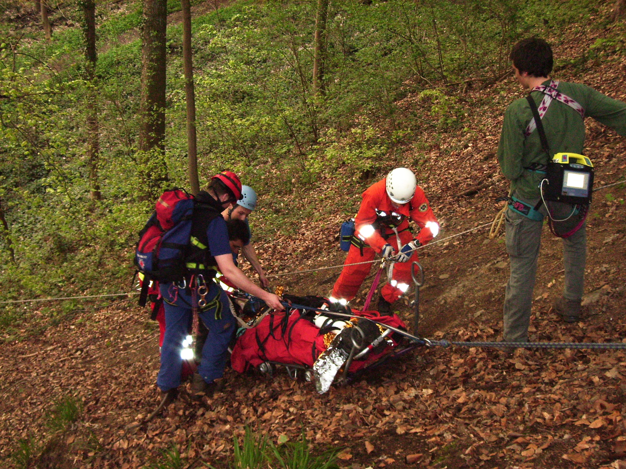 Abtransport eines Patienten mit Gebirgstrage unter Seilsicherung und mit Seilgeländer zur seitlichen Führung; Übungsszenario Bergwacht Freiburg Patient in mountain rescue stretcher, secured with ropes, training event of German Black Forest Mountain Rescue Freiburg i. Br.